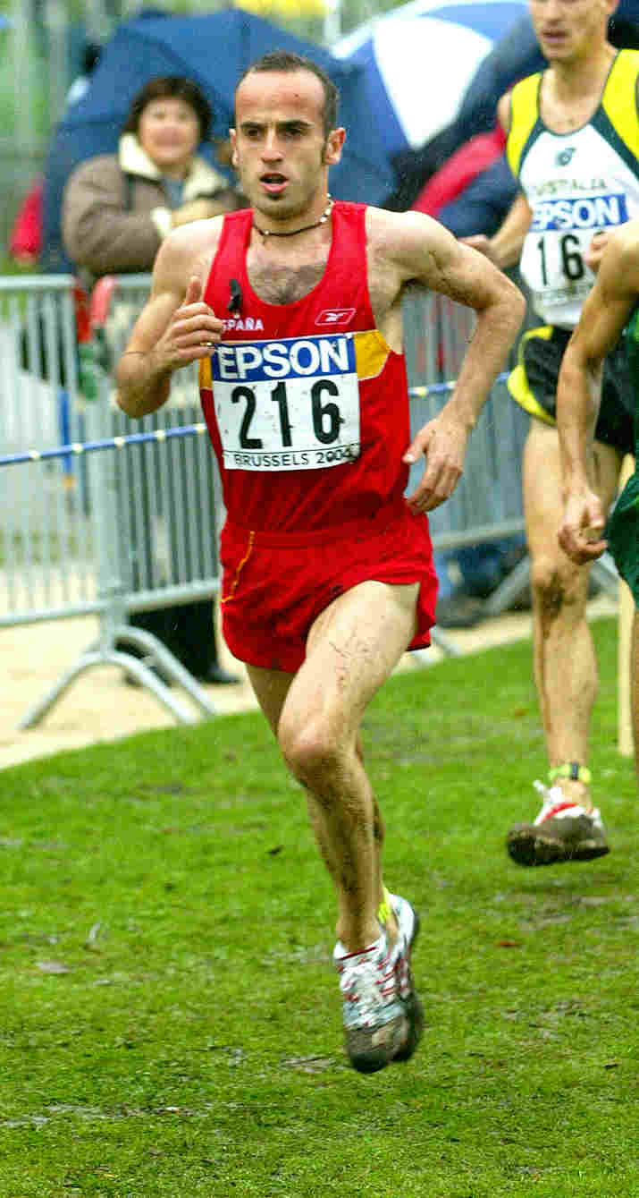 El atleta Carlos García natural de Fuendejalón (Zaragoza, Aragón) corriendo en Bruselas el año 2004.